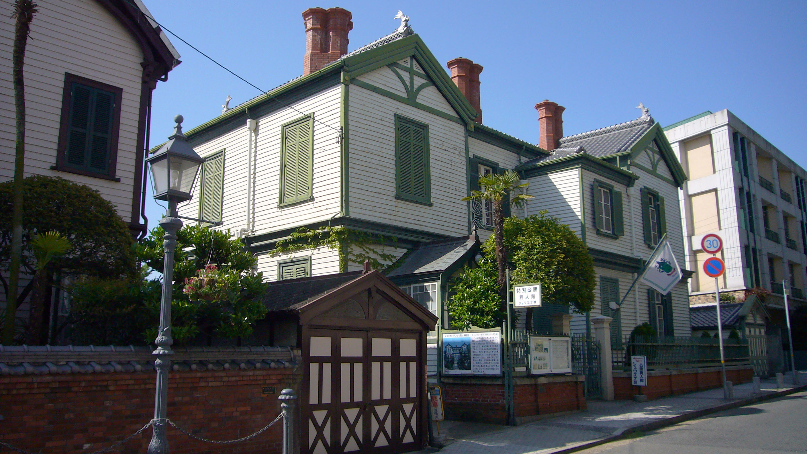 Choueke House in Kobe, Japan